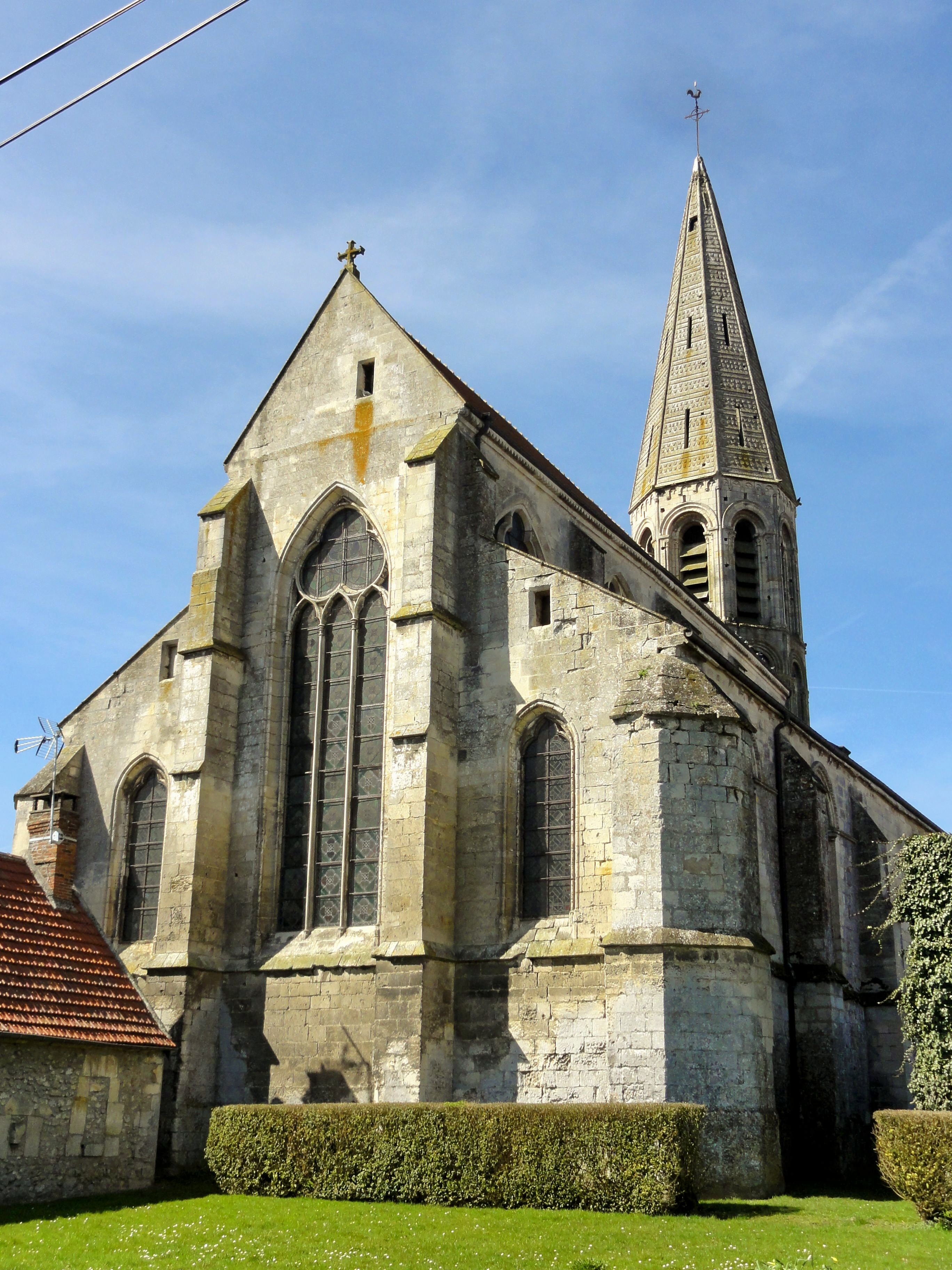 Vue sur le chevet depuis le nord-est.